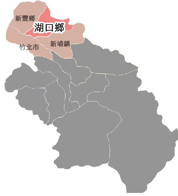 湖口鄉相對位置。